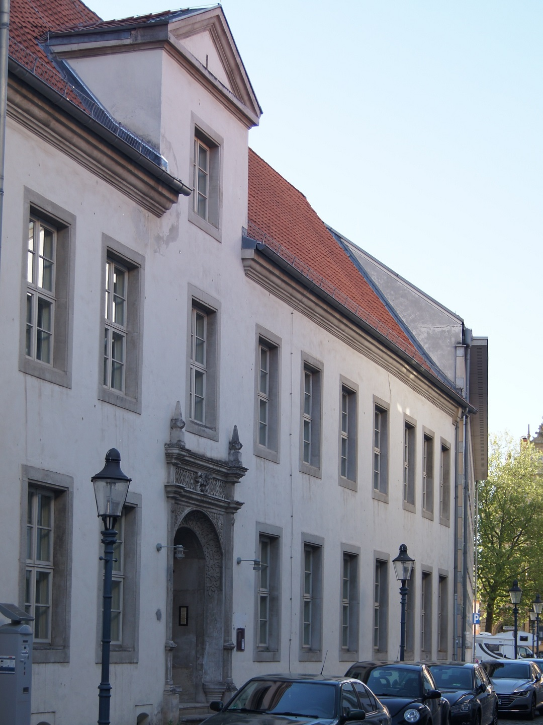 Turnierstrasse 2, Braunschweig; Gesamtansicht des Bauwerks mit Renaissanceportal